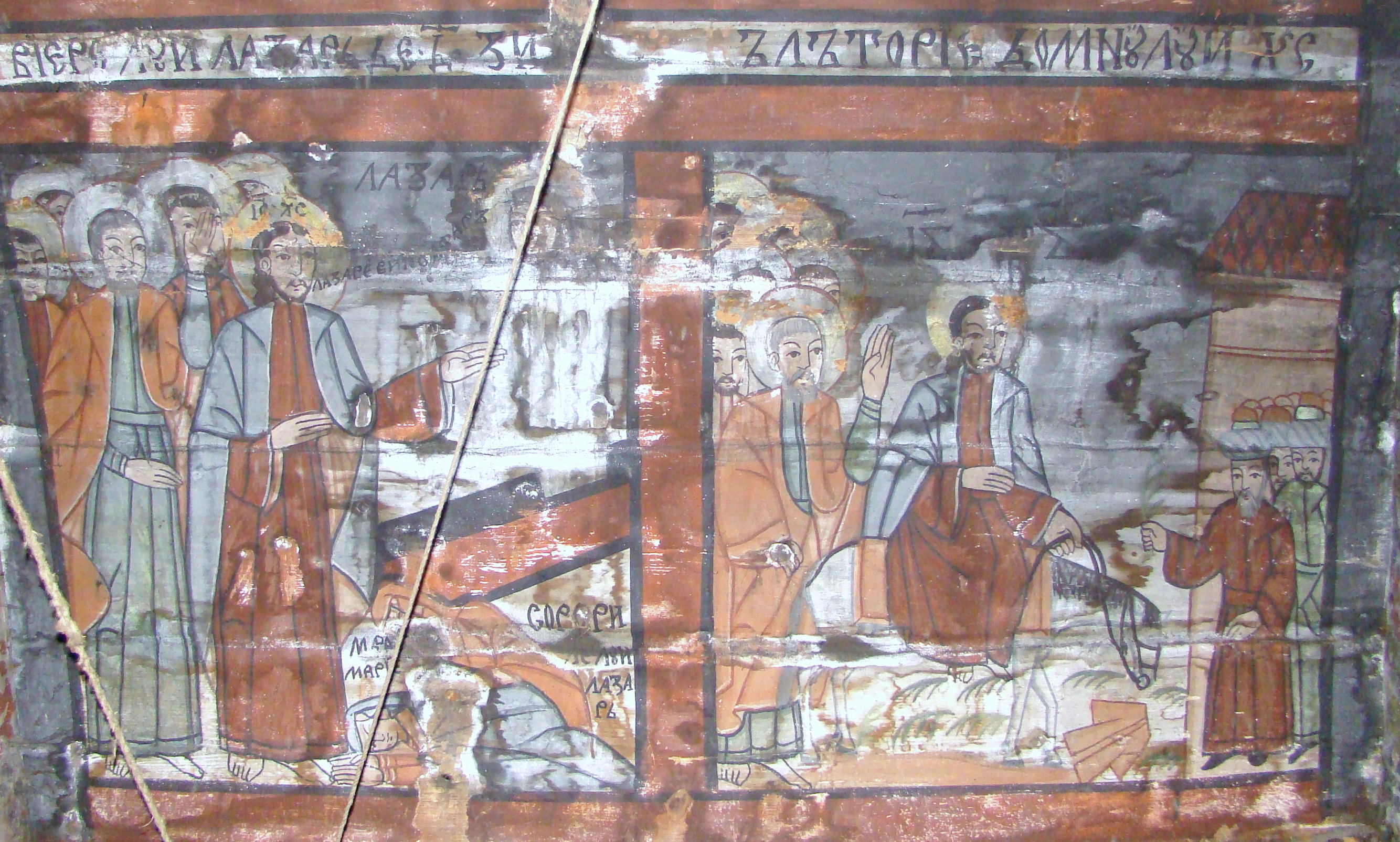 Biserica de lemn din Sărata